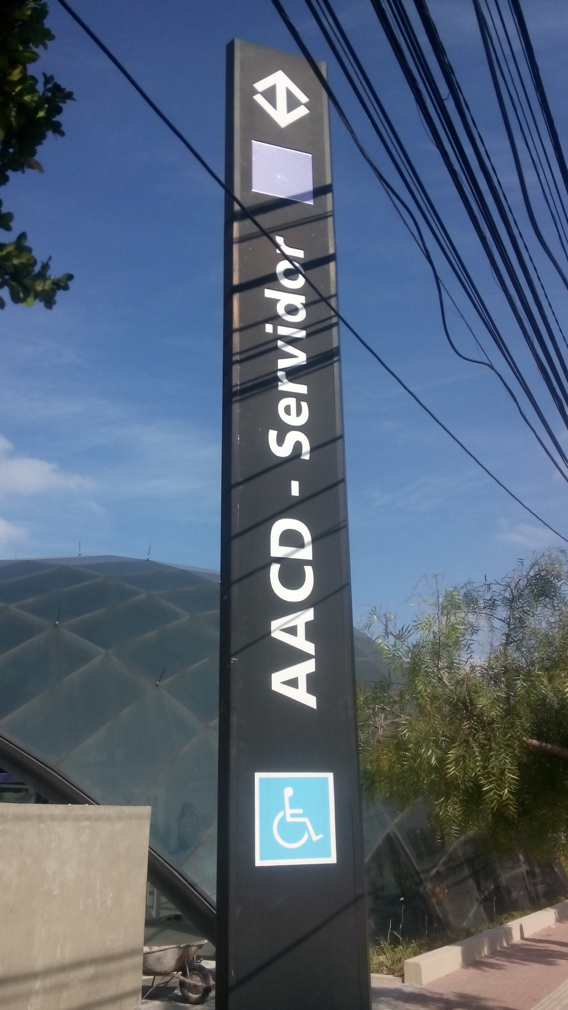 totem da Estação AACD - Servidor, Linha 5 Lilás, Metrô de São Paulo; várias semanas antes de inaugurar